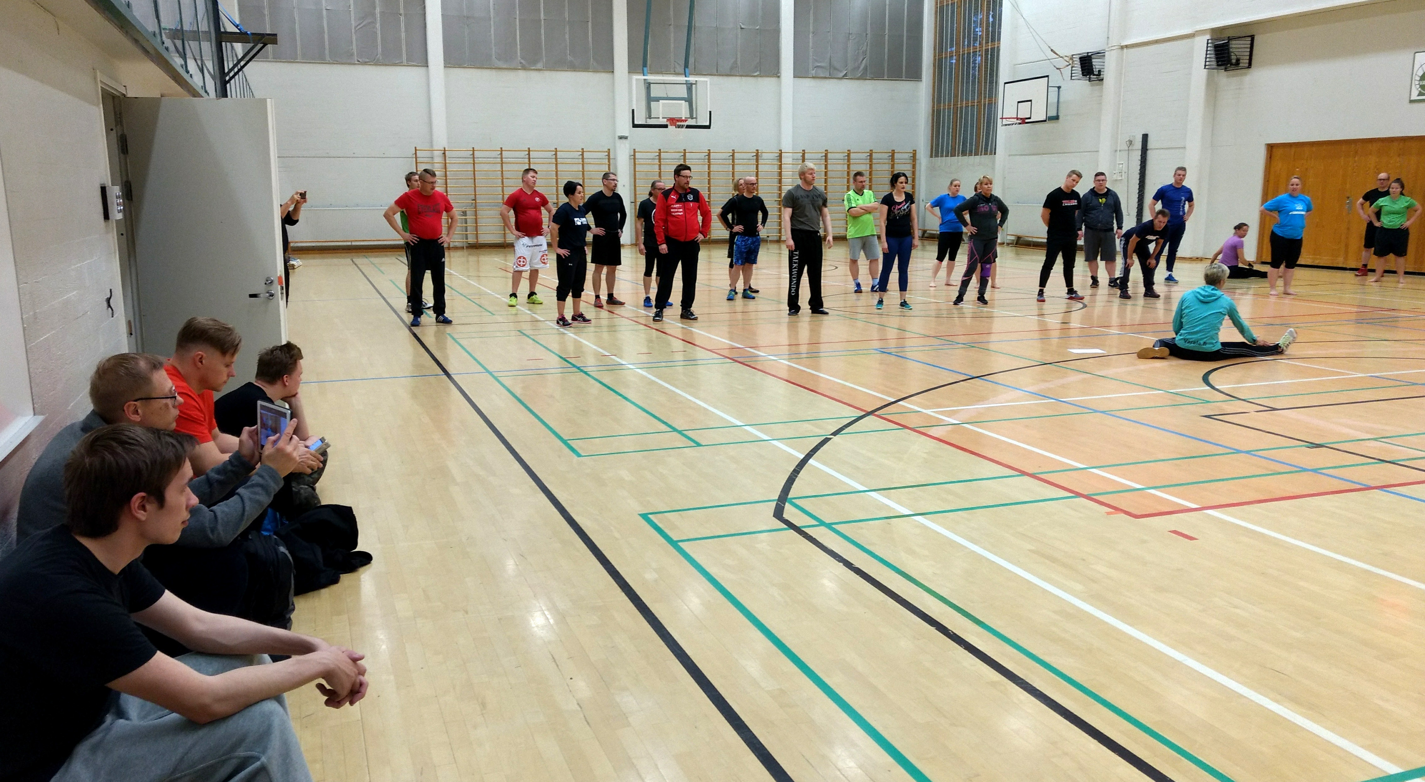 Varalan urheiluopiston halli 1, ja valmentajakoulutettavia